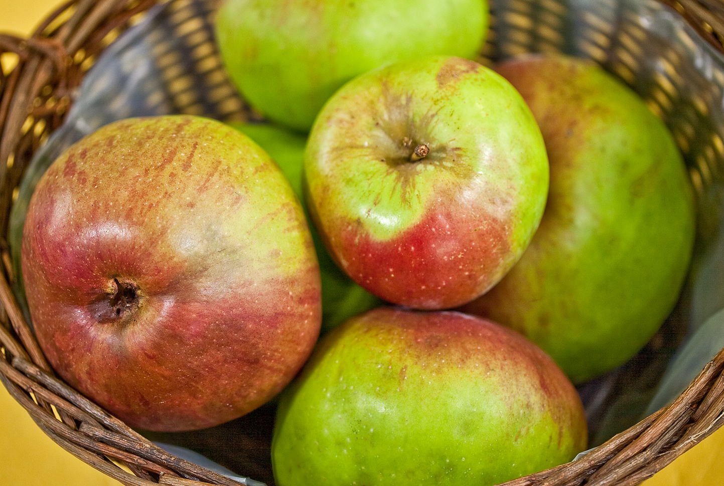 Der Rheinische Winterrambur ist eine Apfelsorte